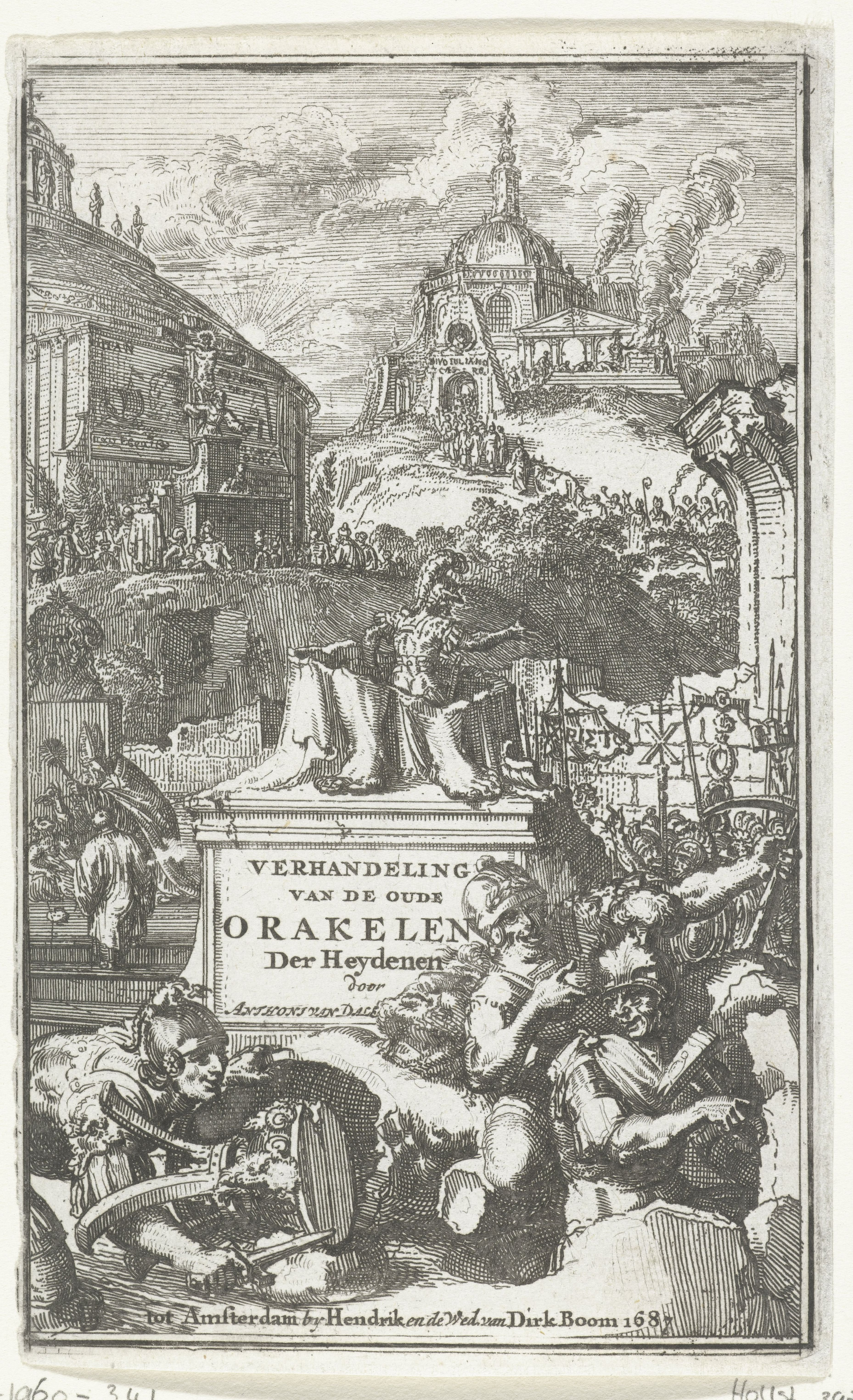 IdentificatieTitel(s): Titelprent voor 'Verhandeling van de oude orakelen der Heydenen' van Anthoni van DaleVerhandeling van de oude orakelen der Heydenen door Anthoni van Dale (titel op object)Objecttype: prent boekillustratie titelprent Objectnummer: RP-P-1960-341Catalogusreferentie: Hollstein Dutch 397Opschriften / Merken: verzamelaarsmerk, verso onder, gestempeld: Lugt 2228aOmschrijving: Sokkel met tekst met daarop afgebroken beeld Waar: van alleen de voeten nog staan. In het holle beeld staat een soldaat. Voor de sokkel ligt de rest van het beeld met eromheen lachende soldaten. Op de achtergrond heuvels met tempels.VervaardigingVervaardiger: prentmaker: Romeyn de Hooghenaar eigen ontwerp van: Romeyn de Hoogheuitgever: Hendrick en Dirk Boom (vermeld op object)Plaats vervaardiging: prentmaker: Haarlemuitgever: AmsterdamDatering: 1687Fysieke kenmerken: etsMateriaal: papier Techniek: etsenAfmetingen: blad: h 154 mm × b 93 mmToelichtingTitelprent voor: Anthoni van Dale, 'Verhandeling van de oude orakelen der Heydenen' (Amsterdam: Hendrik Boom & de Weduwe van Dirk Boom, 1687). Janssen, A.OnderwerpWat: temple, shrine ~ Roman religionstatues, paintings, etc. ~ objects of worship in Roman religionVerwerving en rechtenCredit line: Aankoop uit het F.G. Waller-FondsVerwerving: aankoop 1960Copyright: Publiek domein